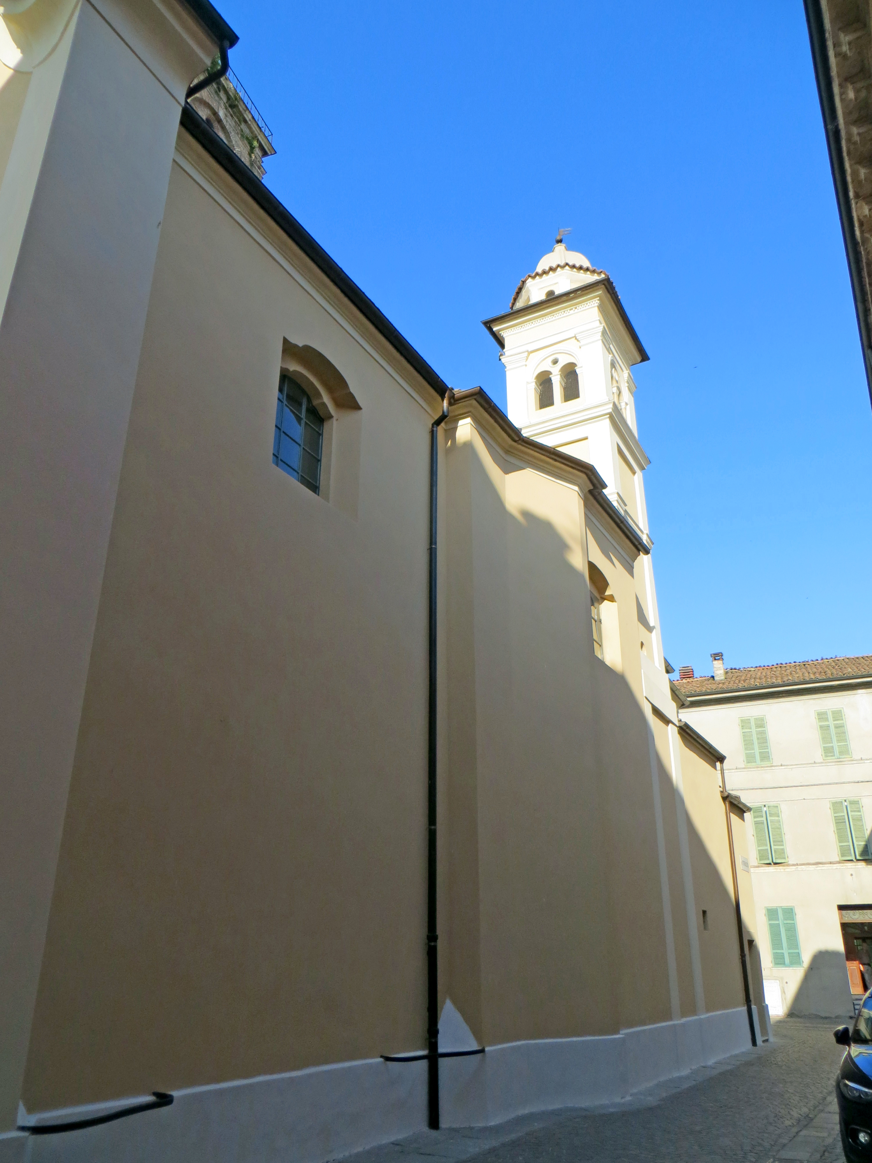 Oratorio della Santissima Trinità (Busseto) - lato sud e campanile